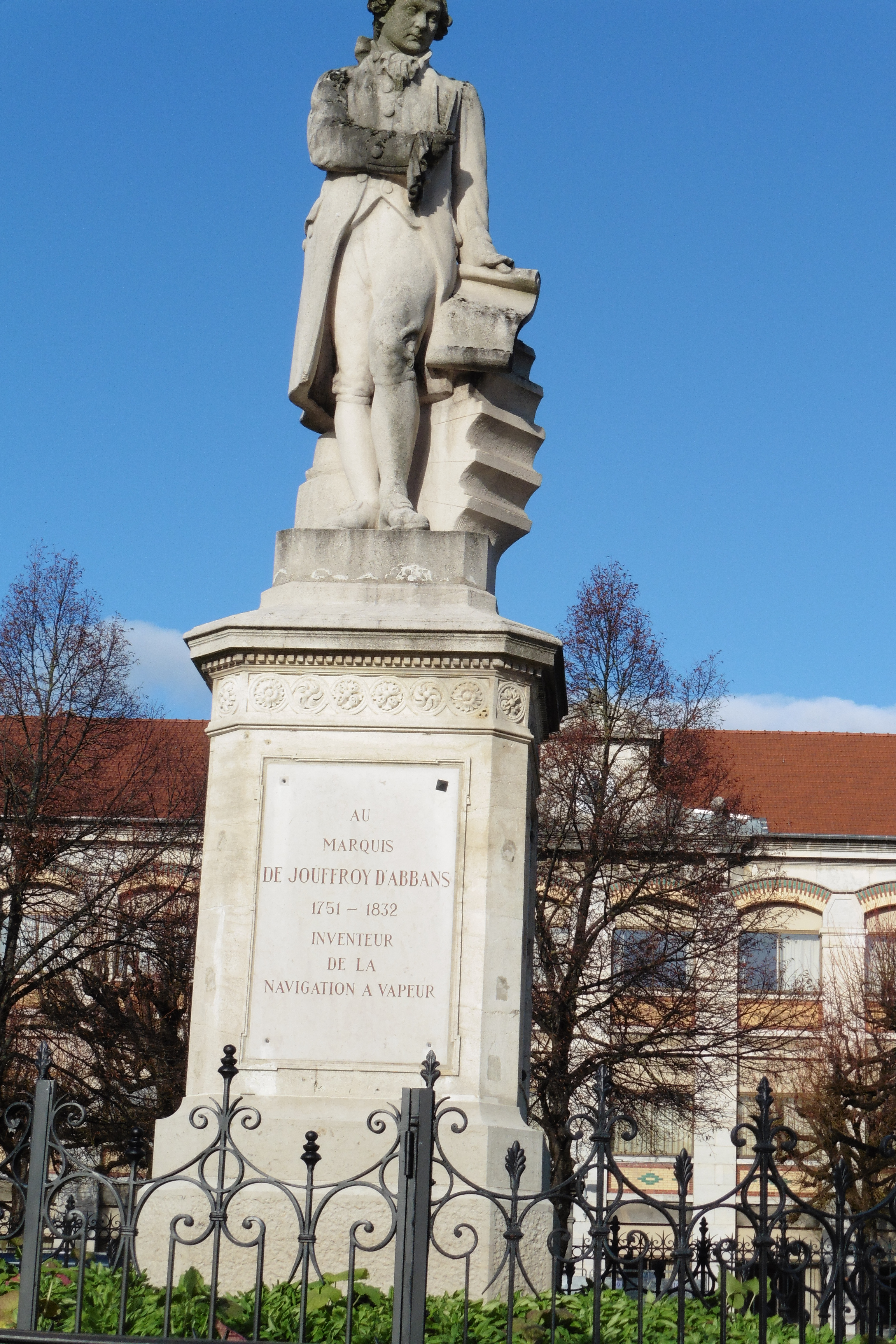 Statue